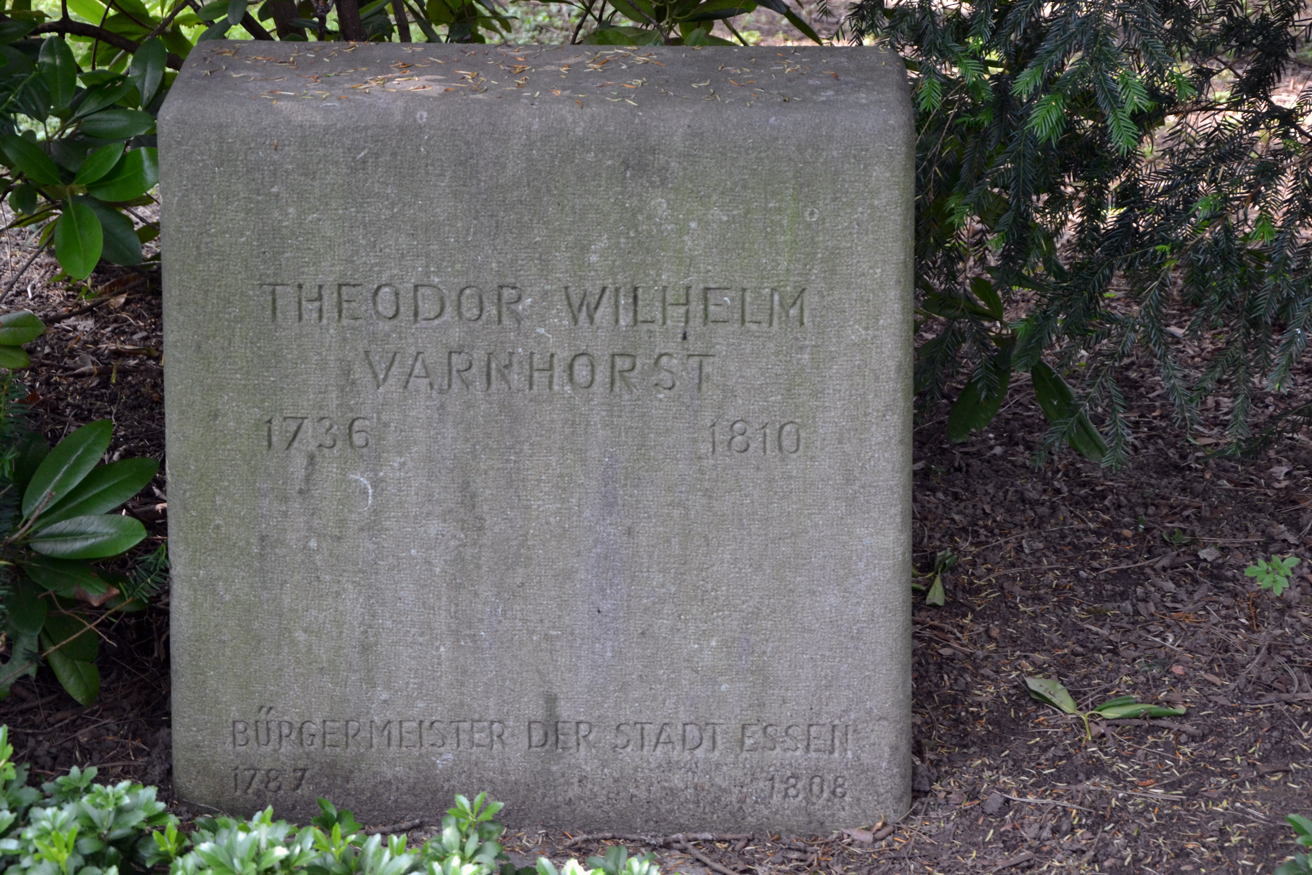 Grabmal auf dem historischen Gräberfeld des Essener Ostfriedhofs, in den 1950er Jahren vom geschlossenen Friedhof am Kettwiger überführt